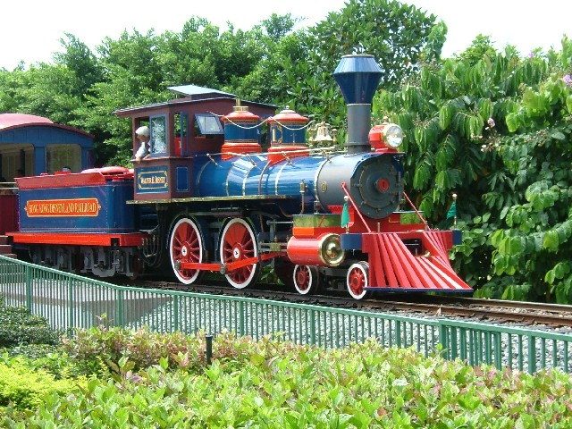 香港迪士尼樂園鐵路火車 (Hong kong Disneyland RailRoad Train)